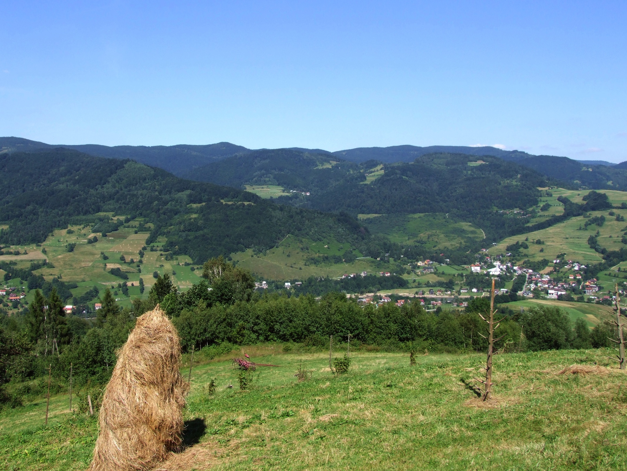 Dolina Popradu, miejscowość Głębokie i dolina Głęboczanki. U góry grań główna Pasma Jaworzyny